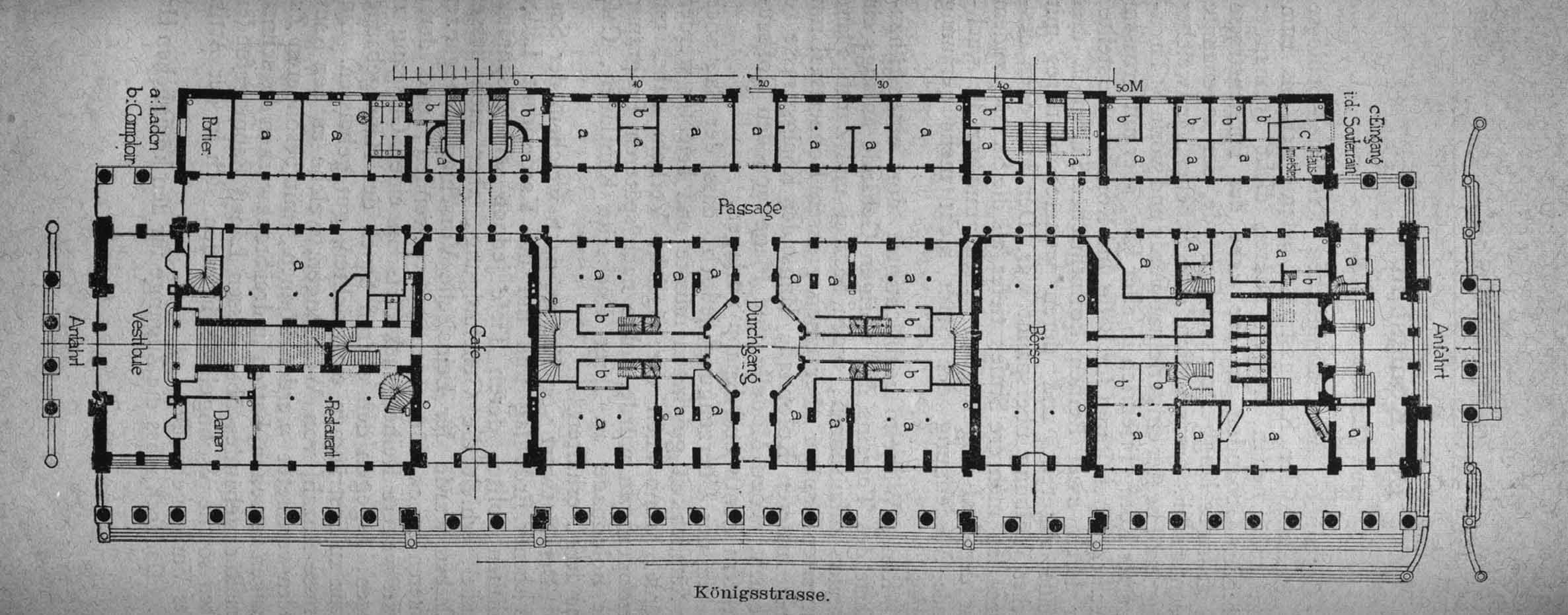 Stuttgart, Königsbau, Grundriss des Erdgeschosses.